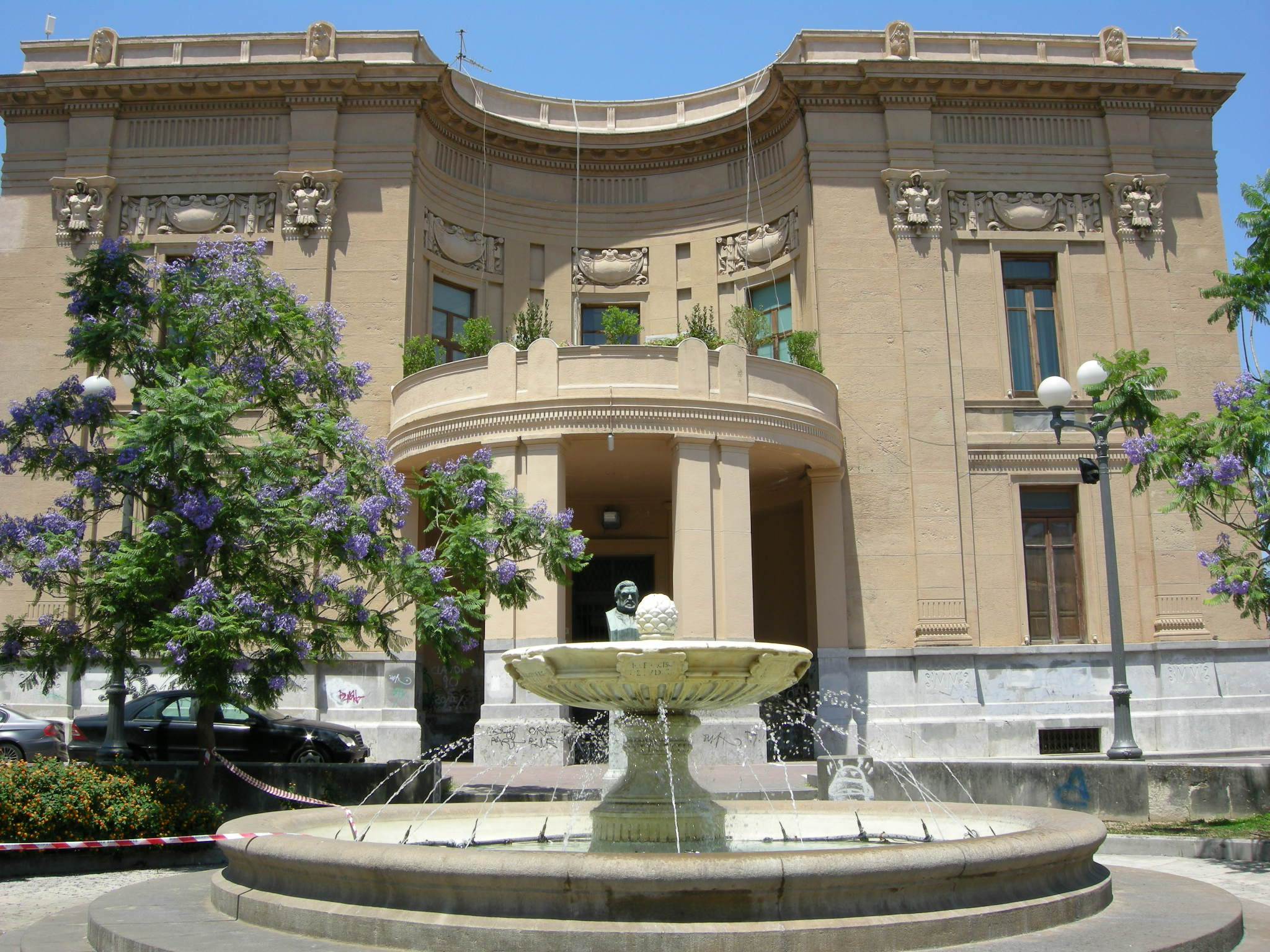 Messina, comune 2